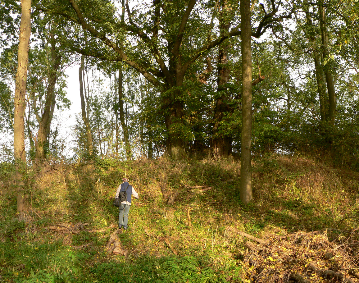 Burgstelle der Burg Brunstein mit angepflanzten Linden